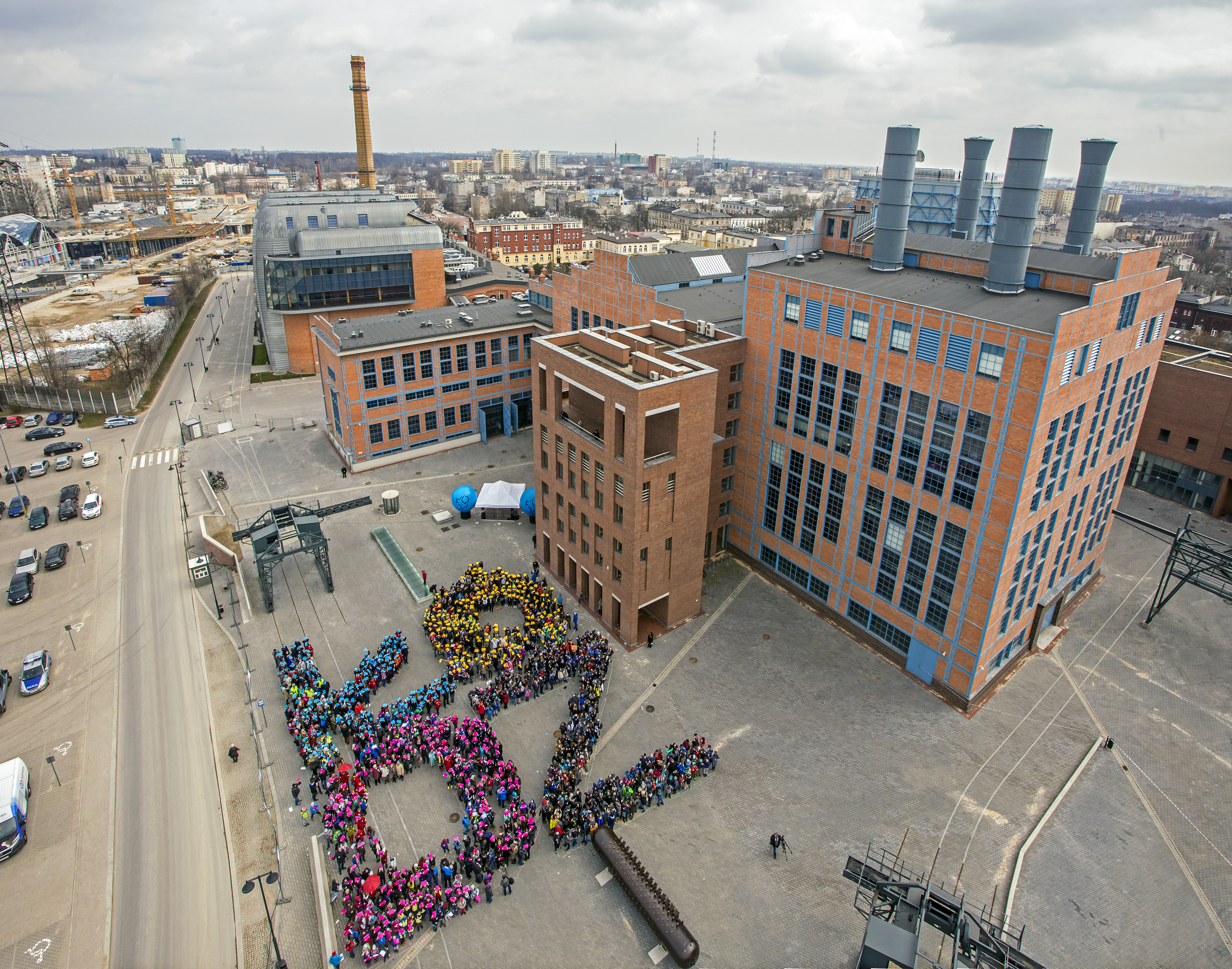 Finał Kolorowej Tolerancji 2016 fot. Stefan Brajter